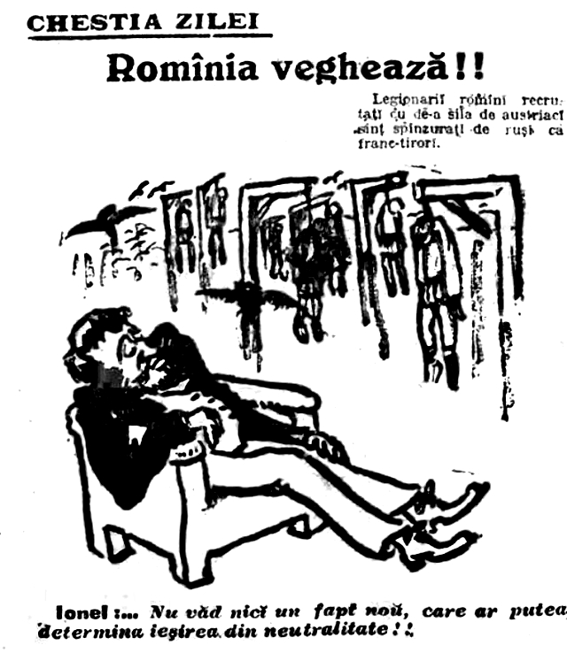 Caricatură "România veghează" din ziarul Adevărul din 8 ianuarie 1915